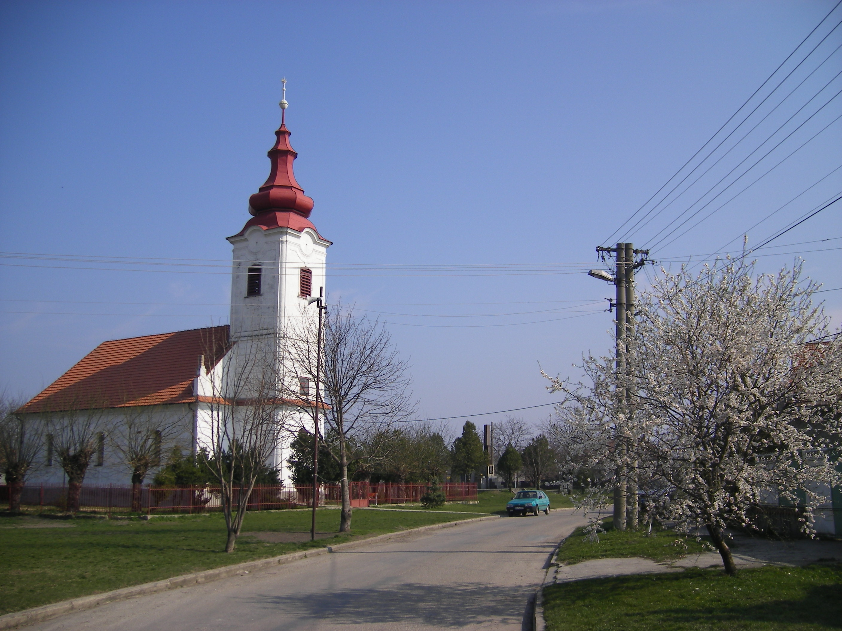 Apácaszakállas - Opatovský Sokolec